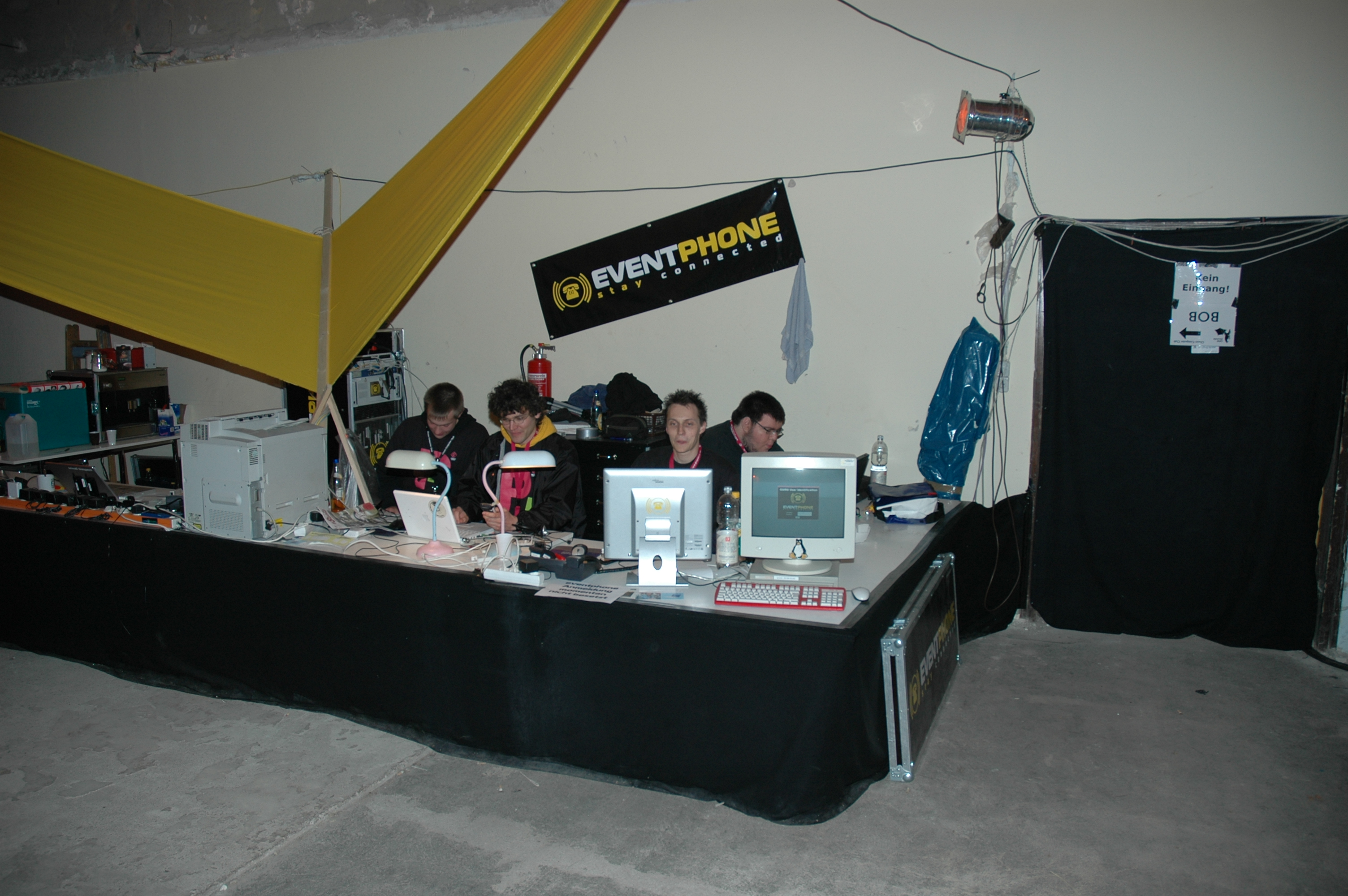 Eventphone beim Festival Berlin 05